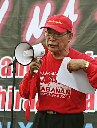 Filipino politician, Crispin Beltran